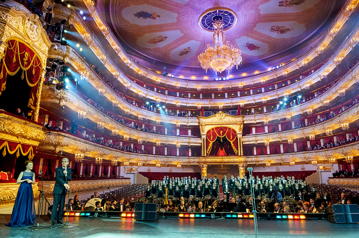 Golden Mask 2014 photographer Dmitriy Dubinskiy